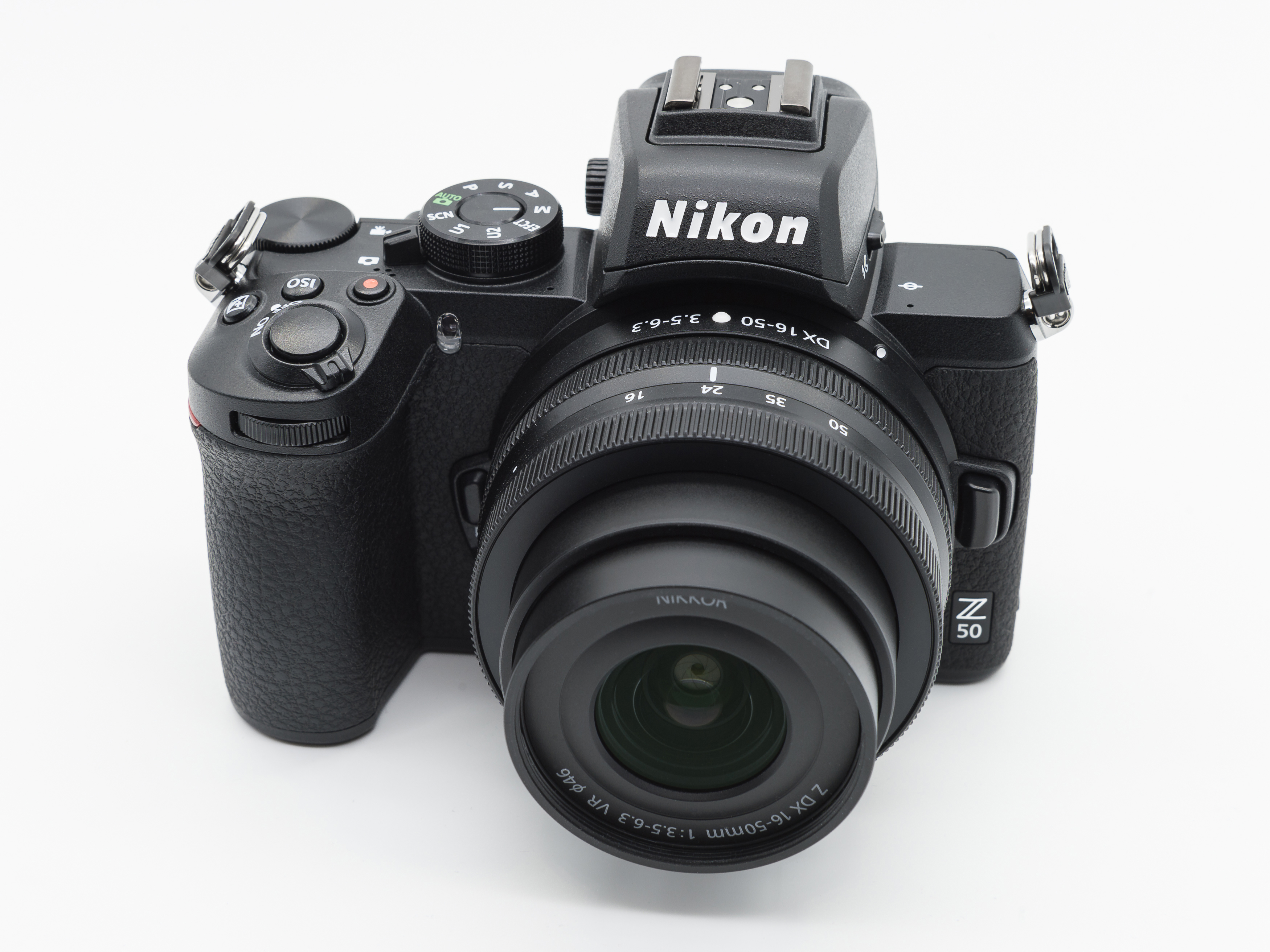 Nikon Z 50 mit Objektiv Nikkor Z DX 16-50 mm f/3.5-6.3 VR